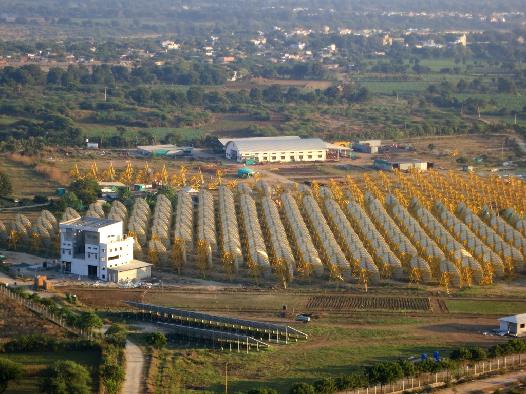 Das Solarkraftwerk "India One" (Dezember 2013)_1